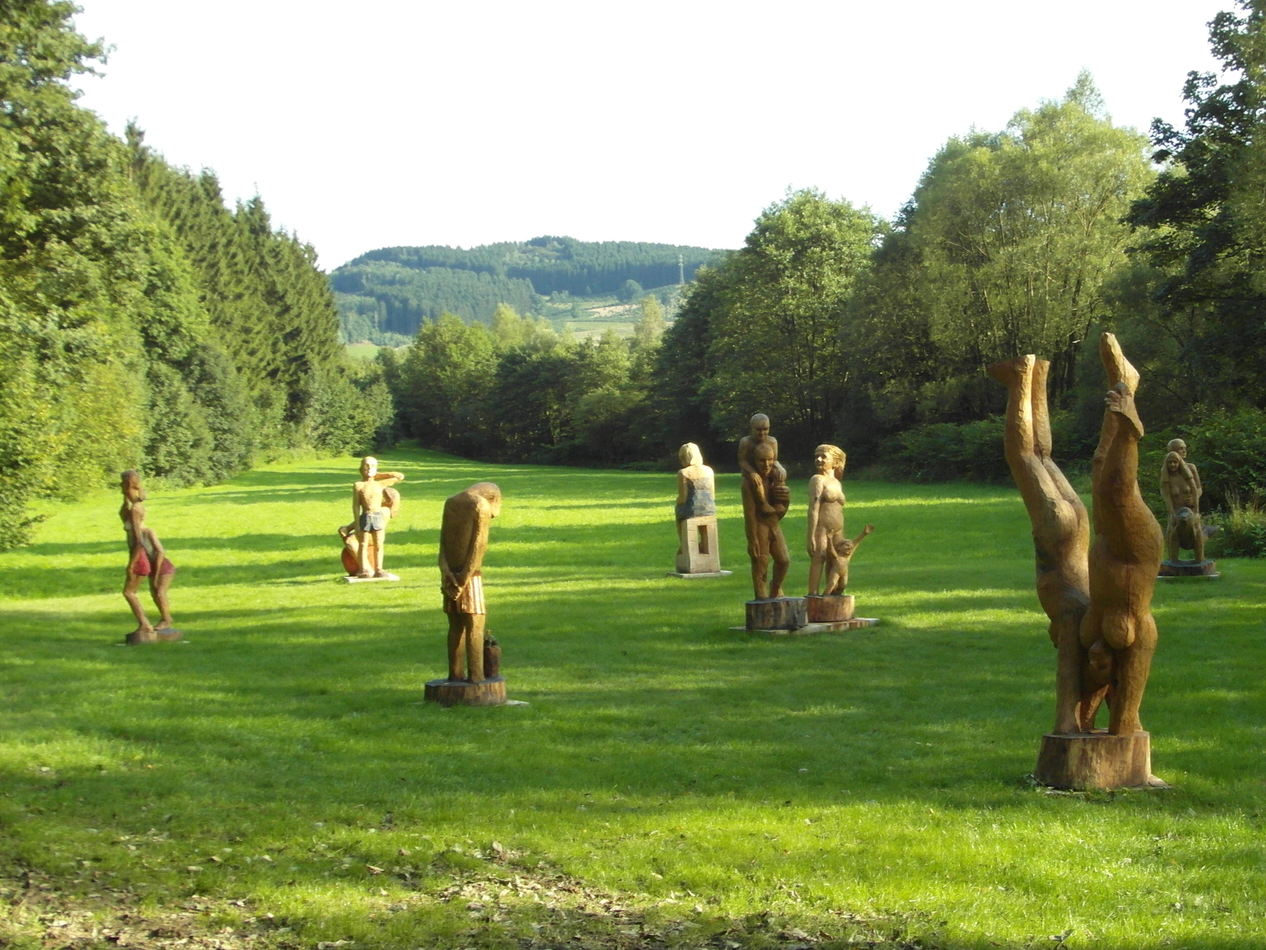 Im August 2015 eröffnete Skulpturenwiese an der Lenne nahe Theten